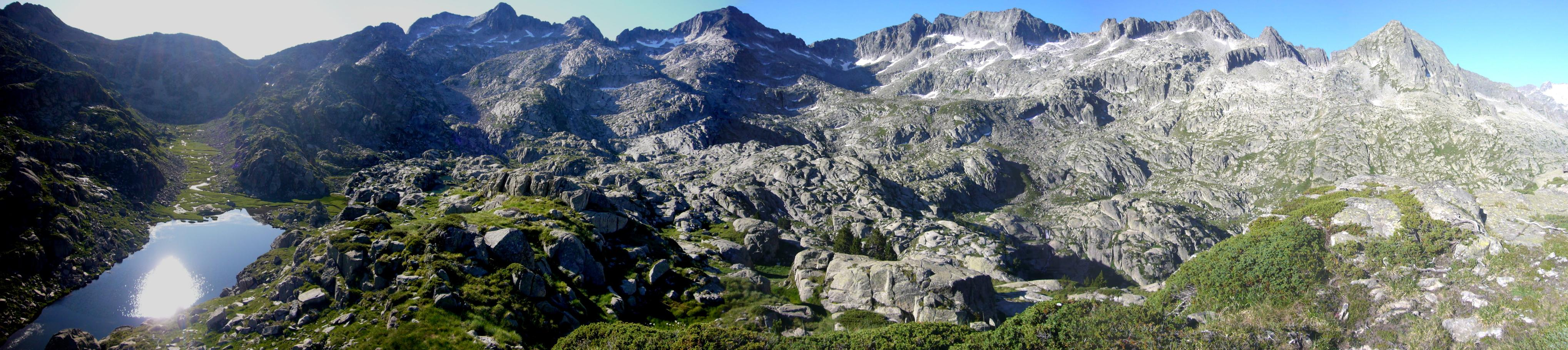 Cims Meridionals a la Vall de Colieto.JPG, vists des del Bony dels Estanyets de Colieto; la Vall de Boí, Alta Ribagorça, Catalunya